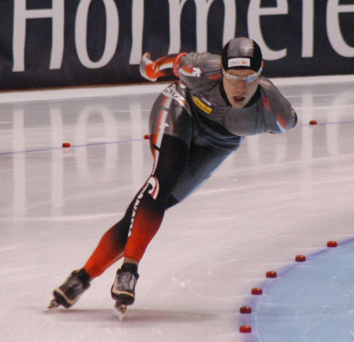 Arne Dankers (CAN) at a World Cup speedskating in Heerenveen (NED)